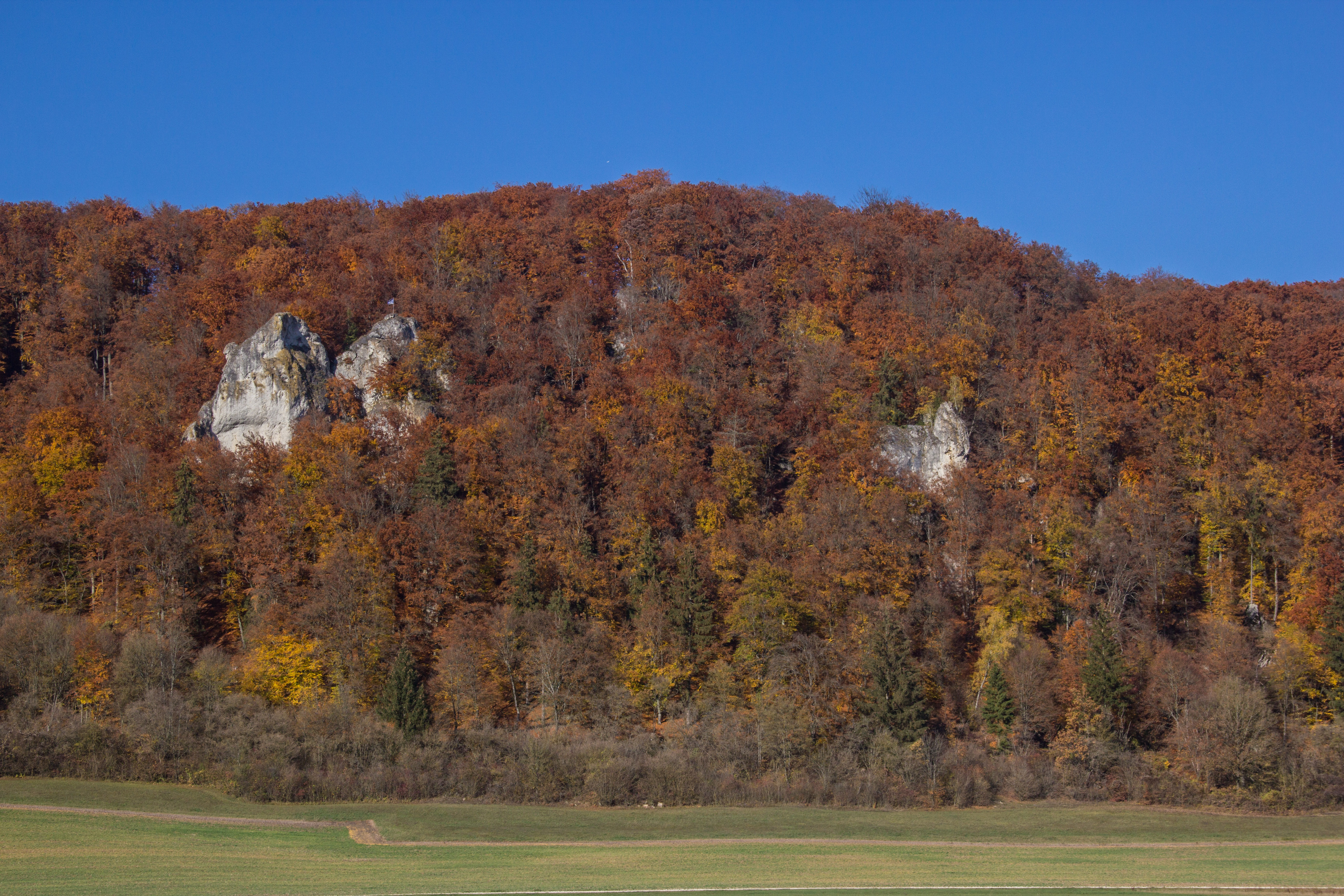 Felsgruppe in der Groppenhofener Leite von Ried, Dollnstein, Geotop